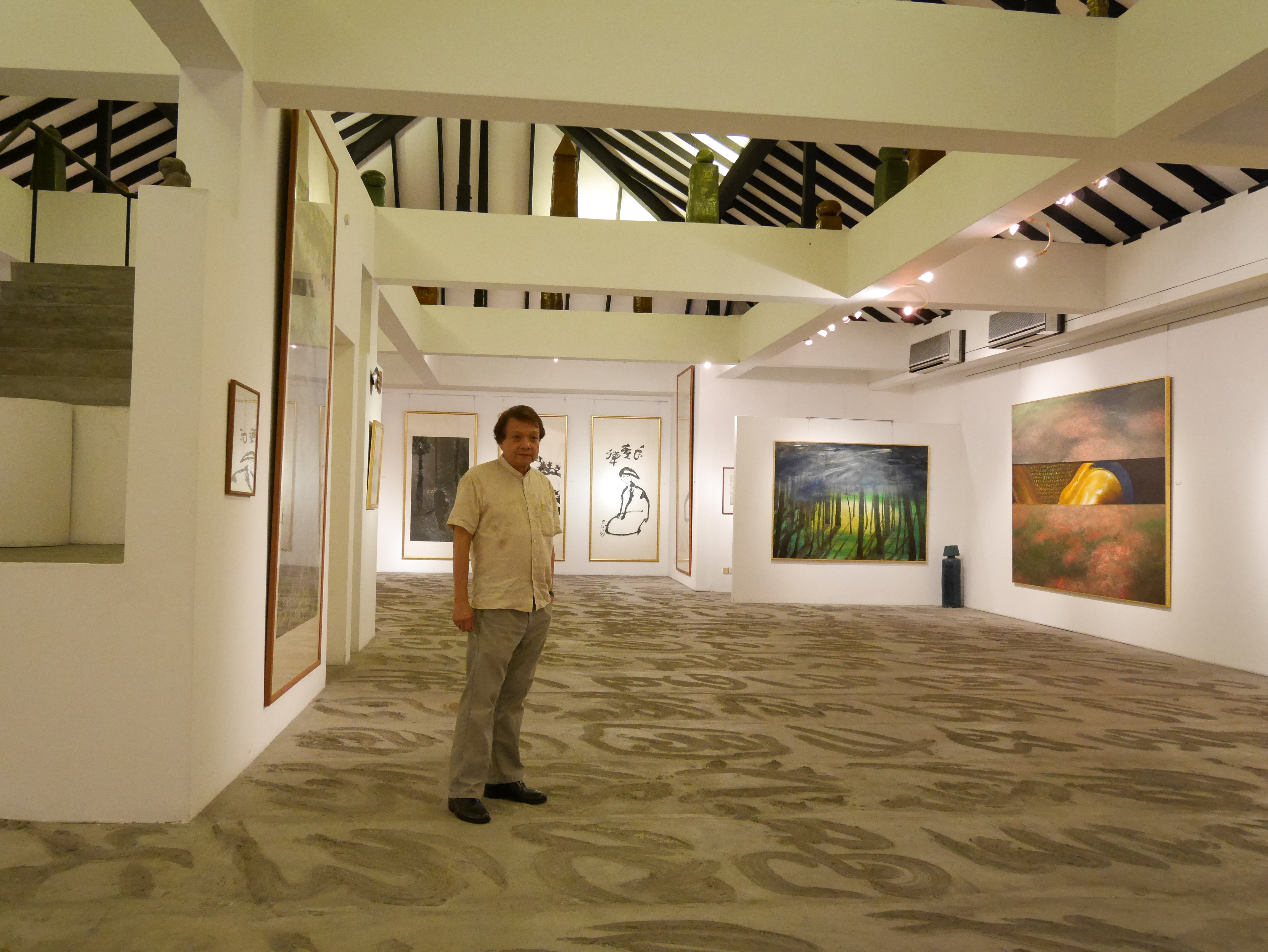 Au sol, une grande calligraphie tracée par TAN lorsque le ciment était encore humide, avant l'inauguration du musée.